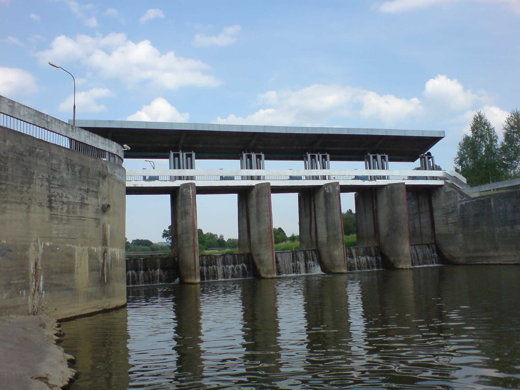 Zapora na Wisłoku w Iskrzyni